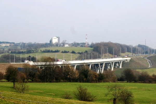 LGV- Bréck bei Herve.